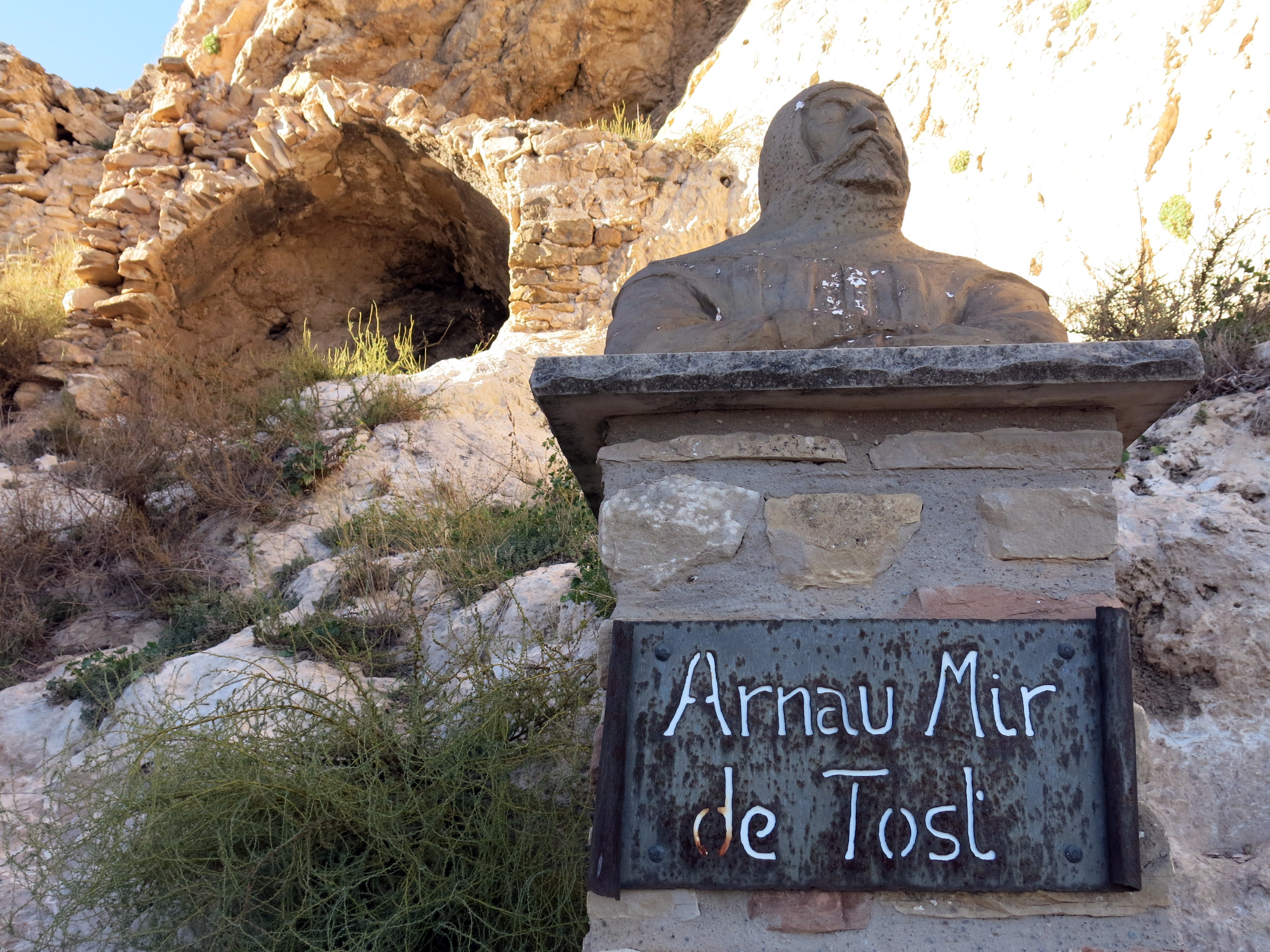 Arnau Mir de Tost (Foradada), sota la roca Foradada